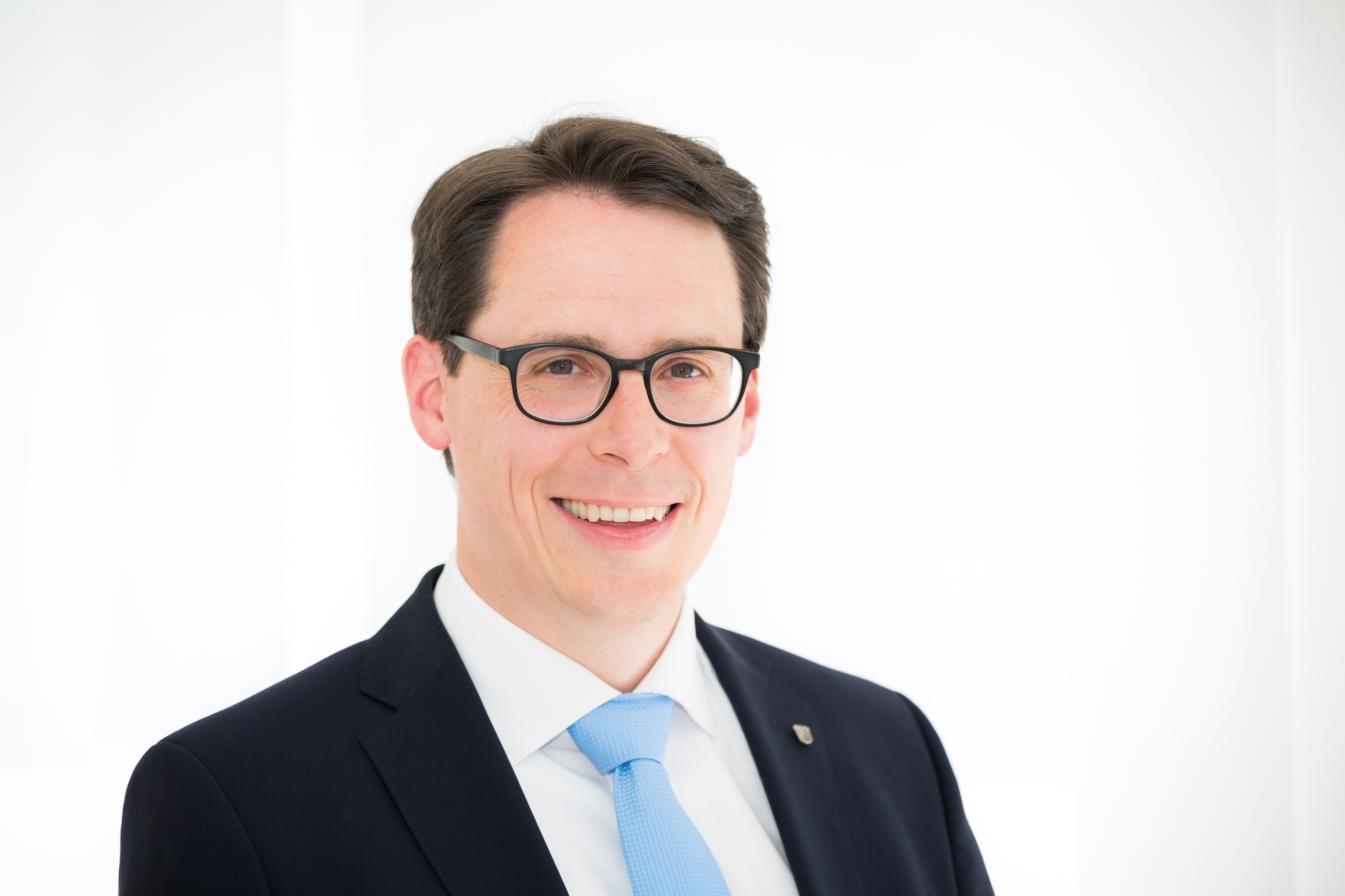 Dr. Christian Moser, Oberbürgermeister der Stadt Deggendorf